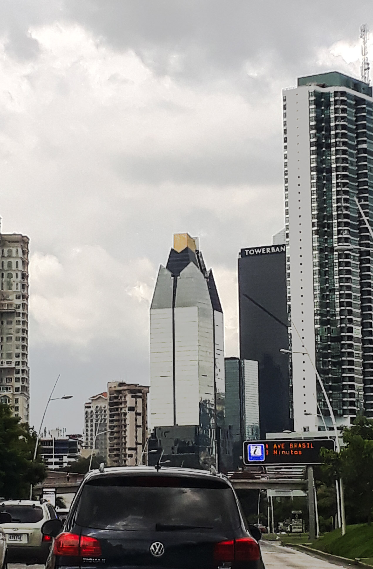 Evolution Tower Panamá 2017